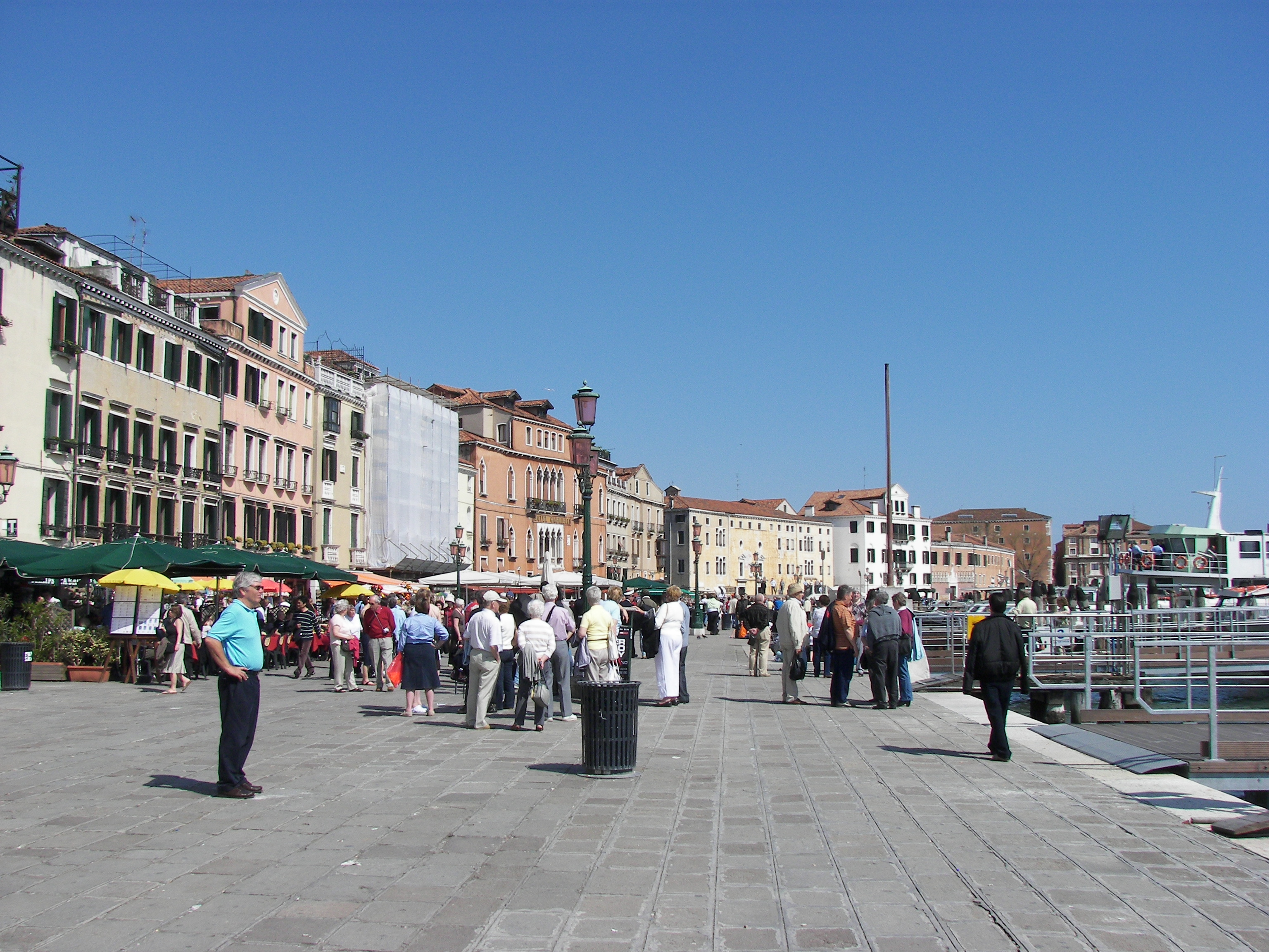 Riva degli Schiavoni in Venezia.